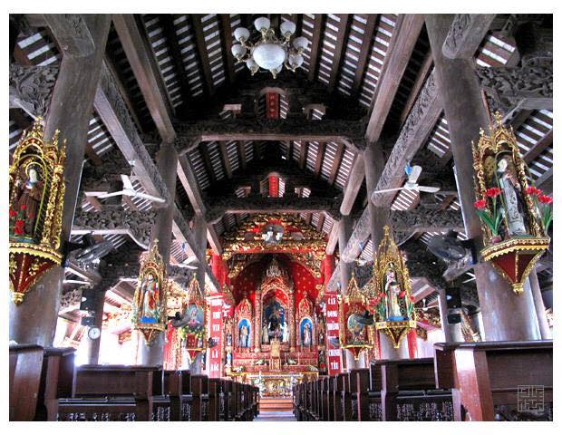 Nội thất nhà thờ